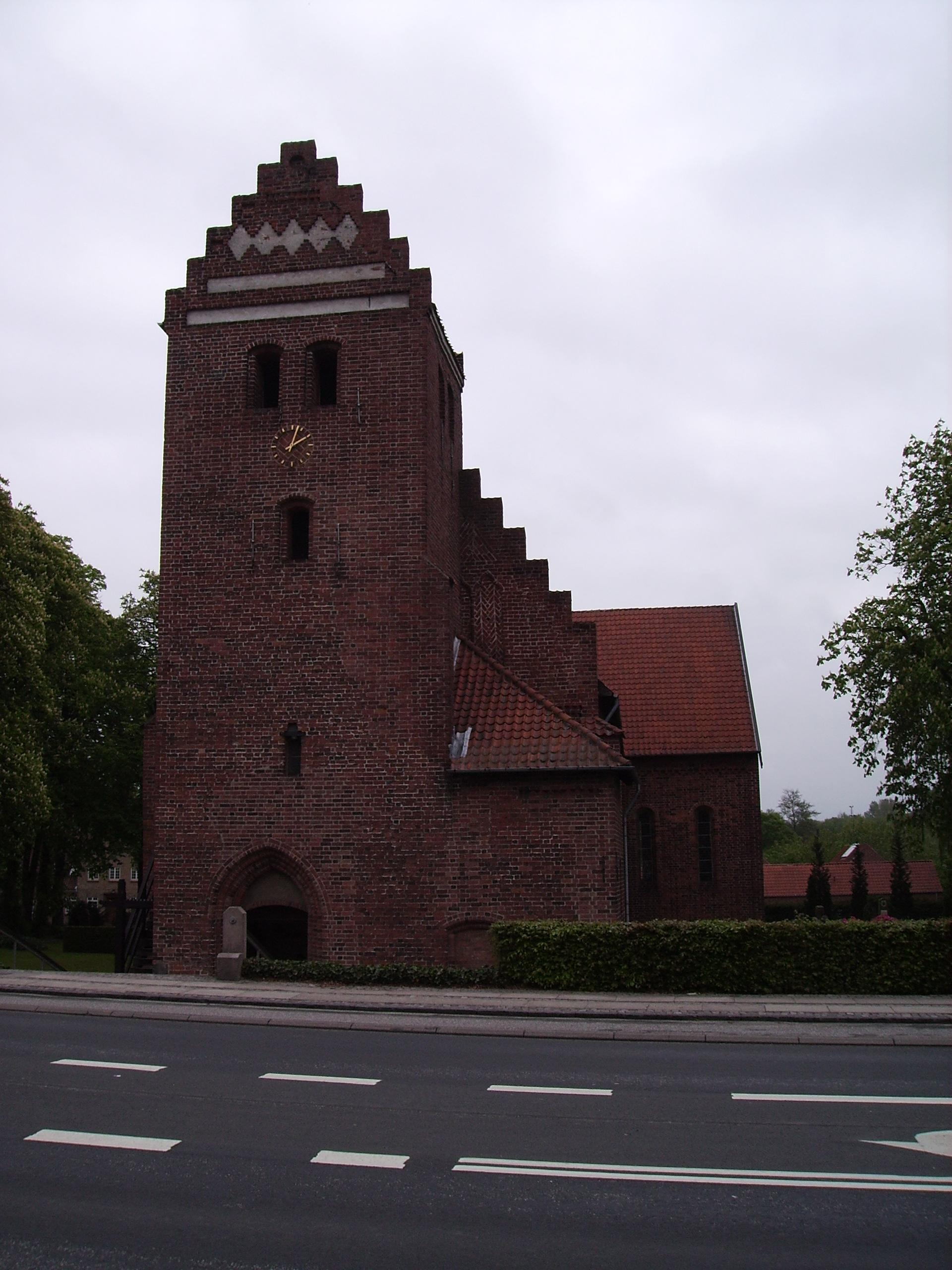 Dalum Kirke, Dalum Sogn, Odense Herred, Odense Amt, Denmark (Danish Church) Date: 17.05.2006 Photographed by Søren Møller